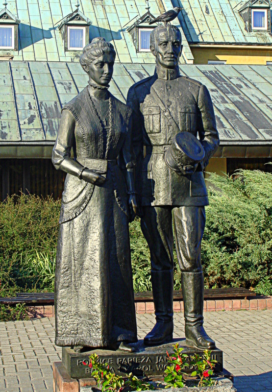 Zespół klasztorny oo. Paulinów: Kościół pw. Wniebowzięcia NMP i Znalezienia Krzyża Św. z kaplicami, zakrystią, skarbcem, wieżą, klasztorem, zabudowaniami gospodarczymi, arsenałem, drukarnią, domem muzykantów, twierdzą z bramami i bastionami, park Częstochowa, Częstochowa 02.1978.